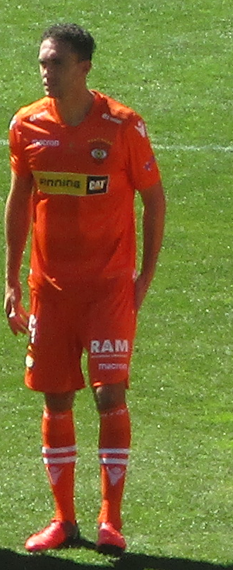 Jugador de Fútbol, Lucas Simon, en Club de Deportes Cobreloa.